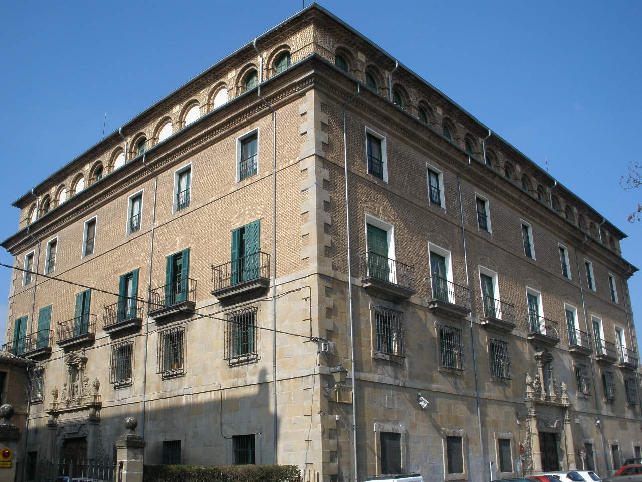 Palacio Arzobispal de Pamplona